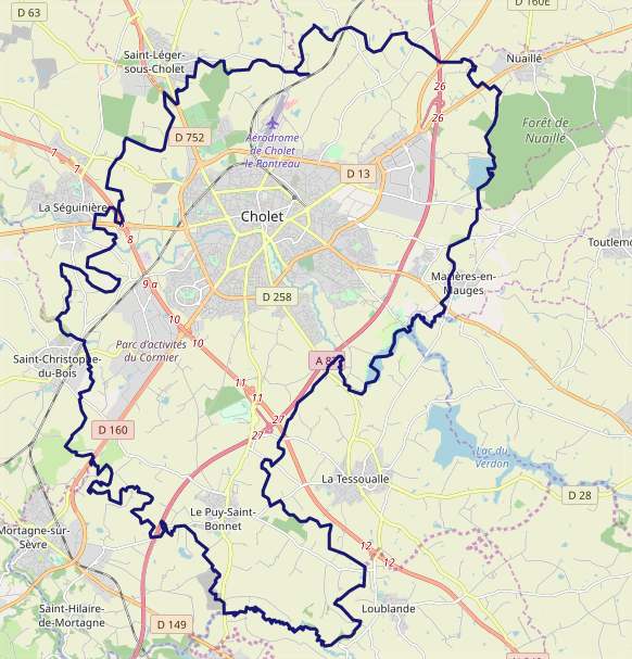 carte réalise sur umap This map may be incomplete, and may contain errors. Don't rely solely on it for navigation.